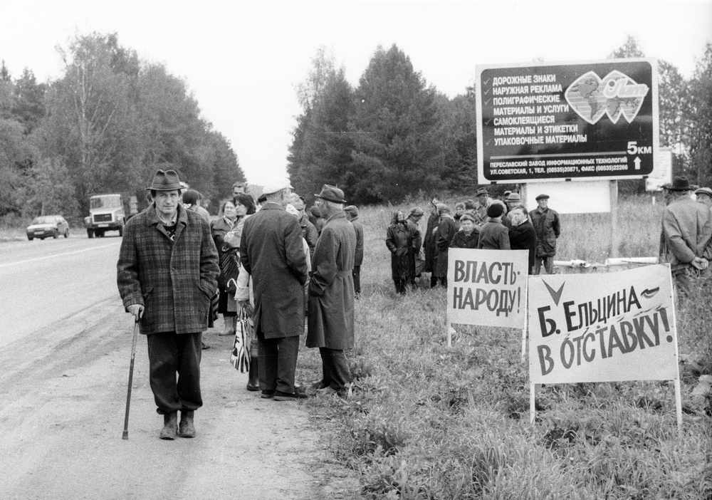 28 августа 1998 года на развилке шоссе при въезде в Переславль состоялся пикет в поддержку требований бастующих шахтёров и учёных, работников ВПК, медиков и учителей, лишившихся социальной поддержки. Участники пикета выразили недоверие президенту Ельцину, призывали к смене правительства. Лозунги на плакатах: «Власть — народу!», «Б. Ельцина — в отставку!»